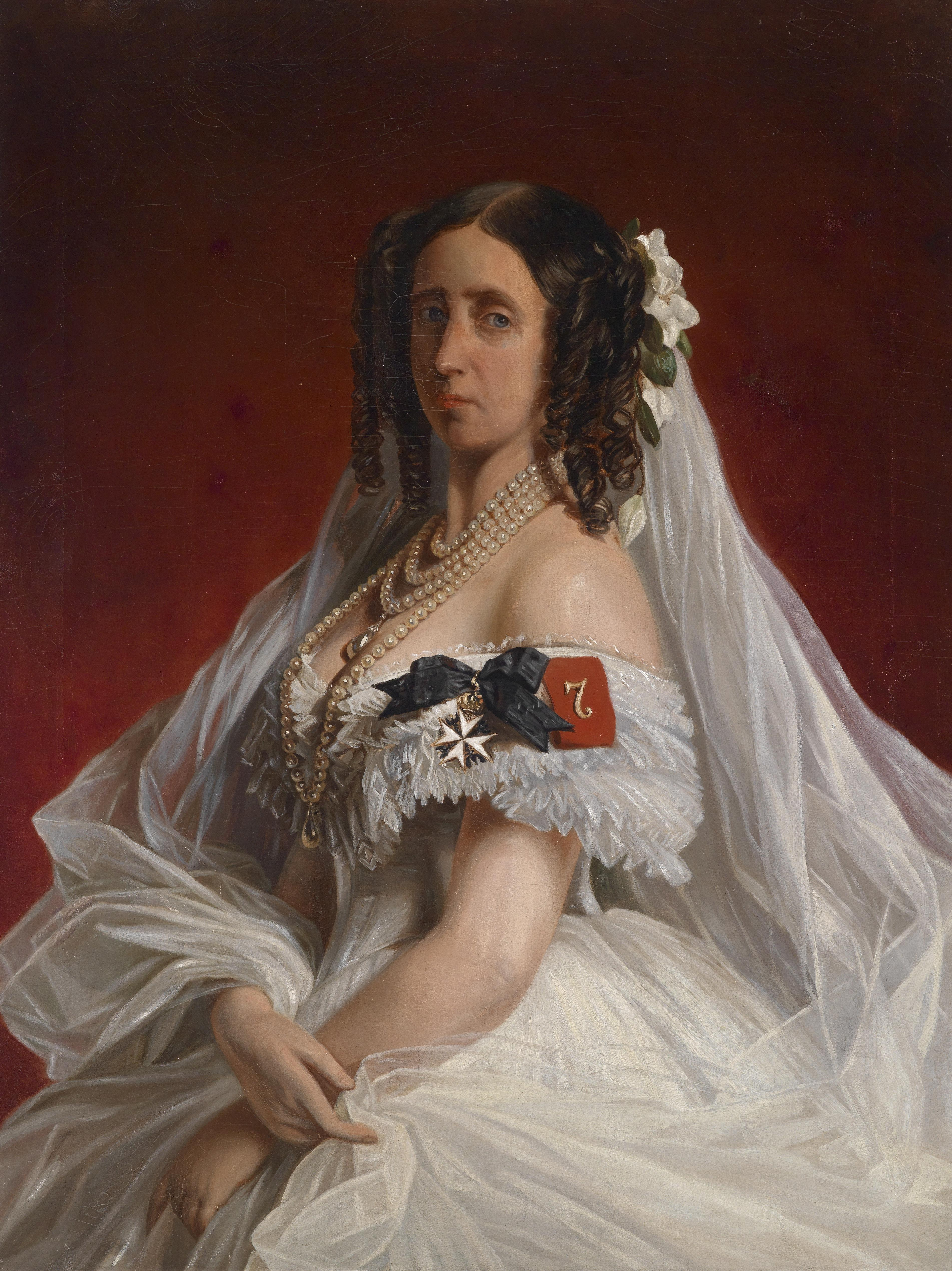 Bildnis der Prinzessin Marie Luise Alexandrine von Preußen, geb. Prinzessin von Sachsen-Weimar und Eisenach (1808-1877)